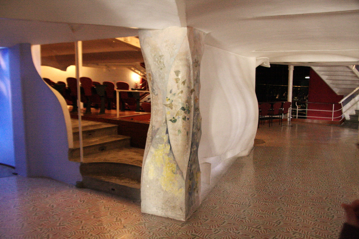 Teatre Metropol (Teatre del Patronat Obrer) a Tarragona (Catalunya), obra de Josep Maria Jujol de 1908. Imatge de l'accés a l'amfiteatre.